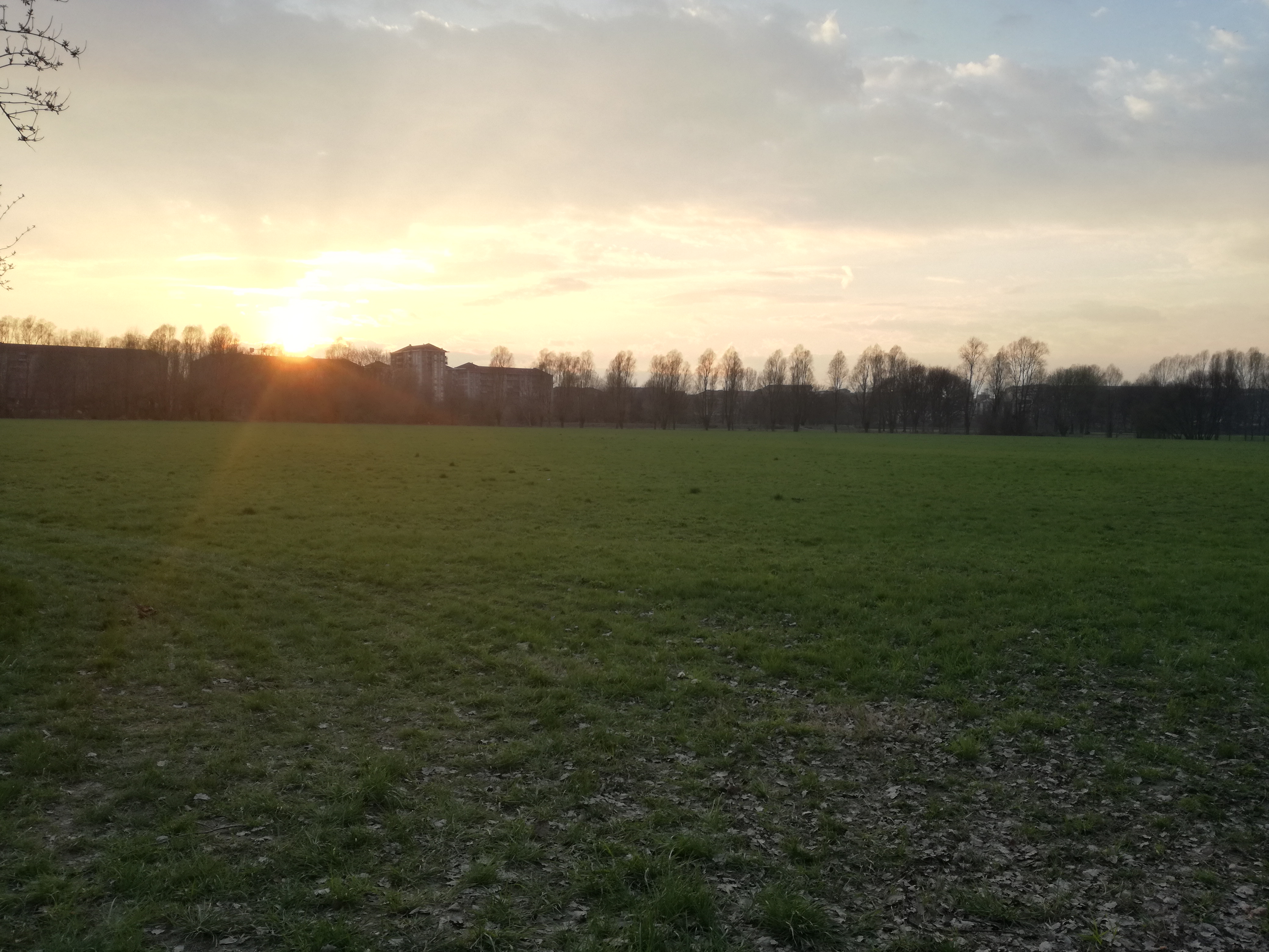 Parco Le Vallere al tramonto